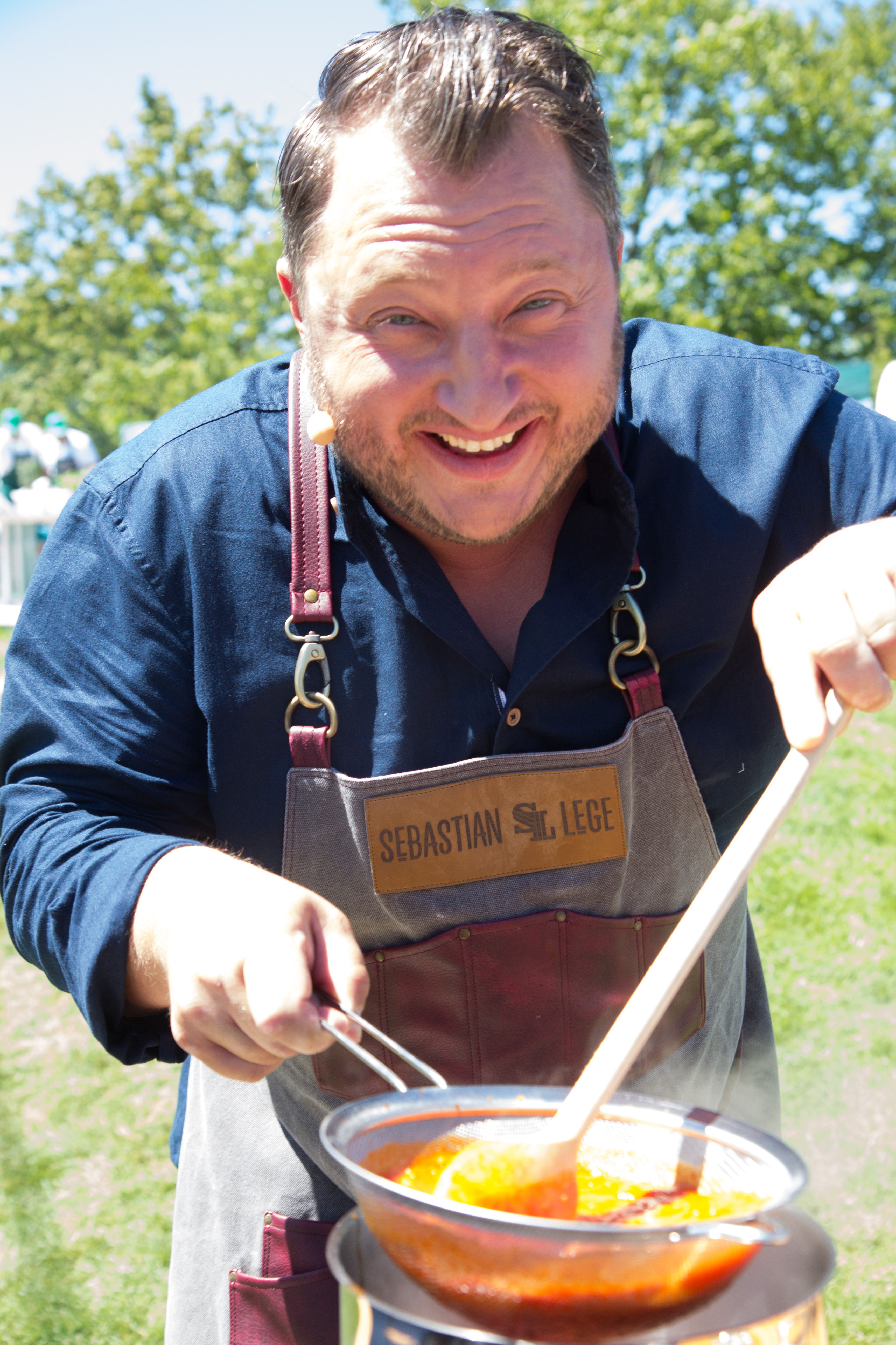 Sebastian Lege als Gast beim ZDF-Fernsehgarten am 1. Juli 2018 in Mainz.